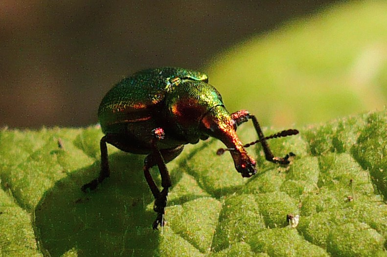 Тополевый трубковерт. Балка Каменный Лог, Белгородская область.